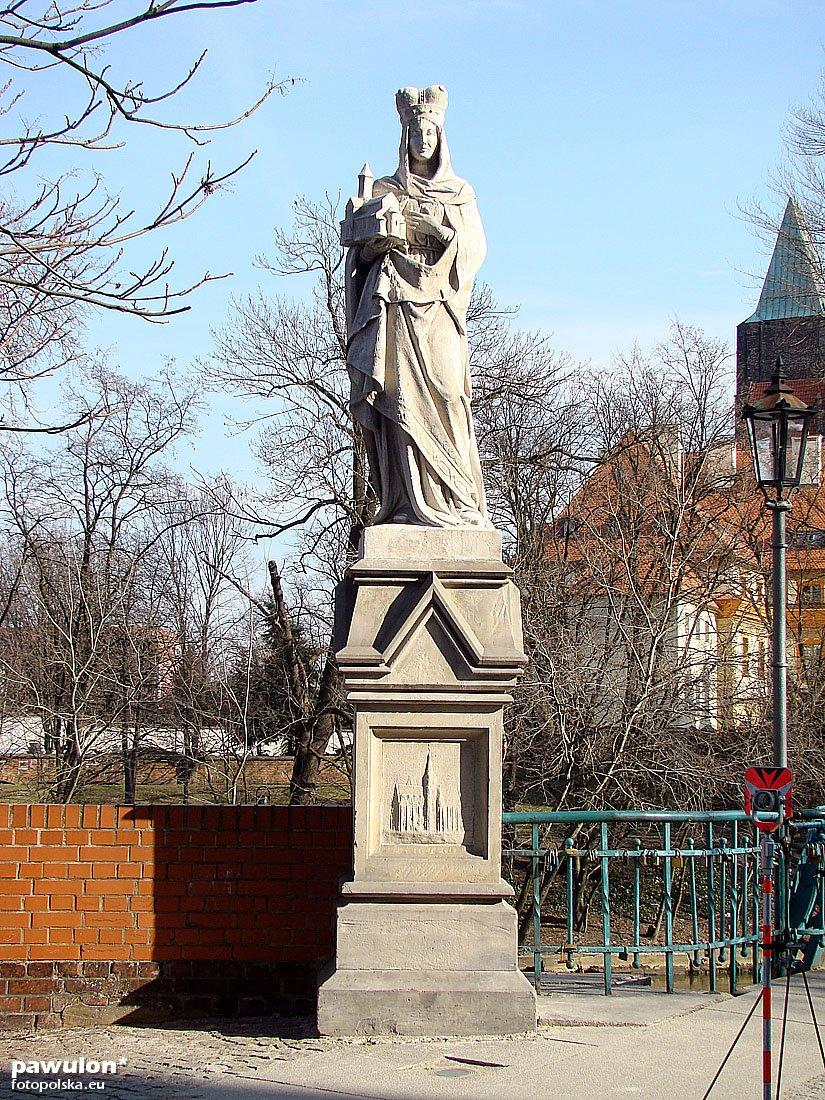 Figura św. Jadwigi